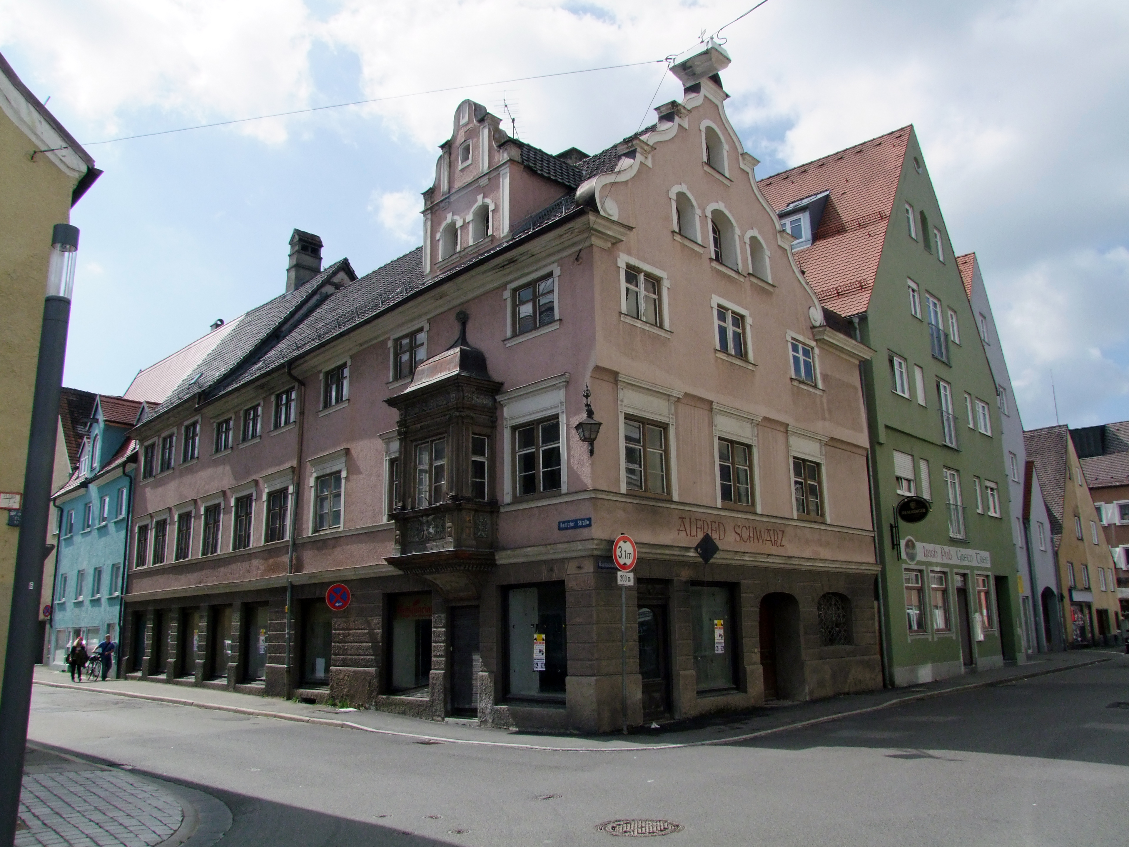 Ecke Kempter- /Baumstraße im oberschwäbischen Memmingen.